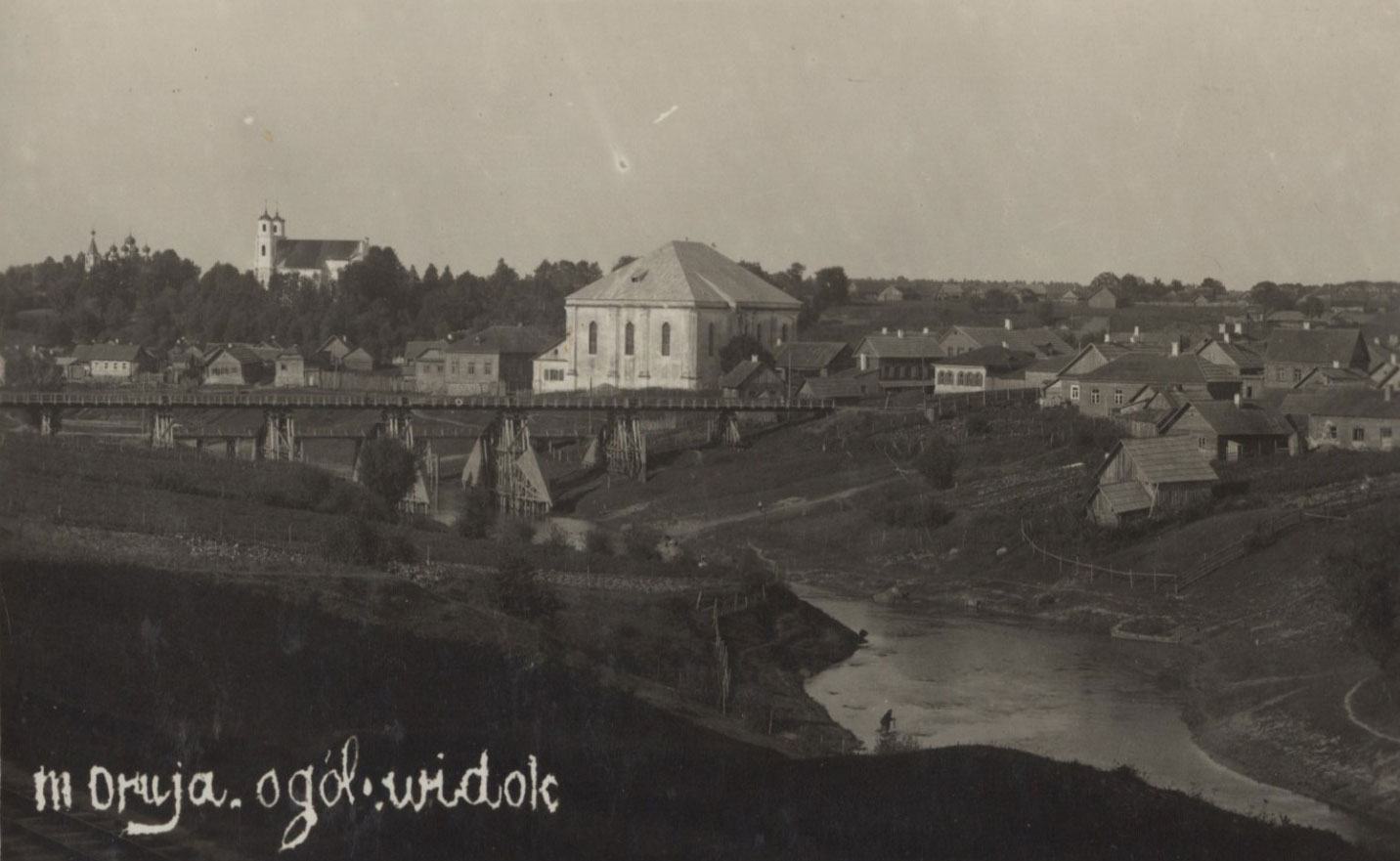 Беларуская (тарашкевіца): Друя (Druja), рака Друйка (Drujka). Сынагога